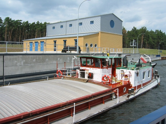 Schleuse Hohenwarthe Photo: R. Vorreyer